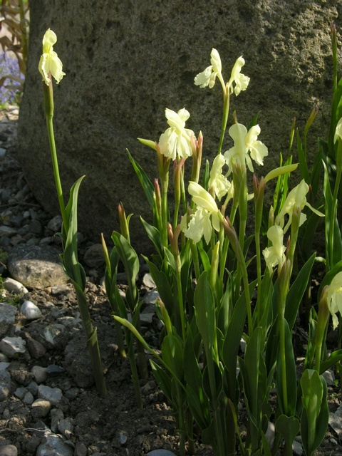 Roscoea cautleyoides groupe Fleurs (Botanisk Have Århus)